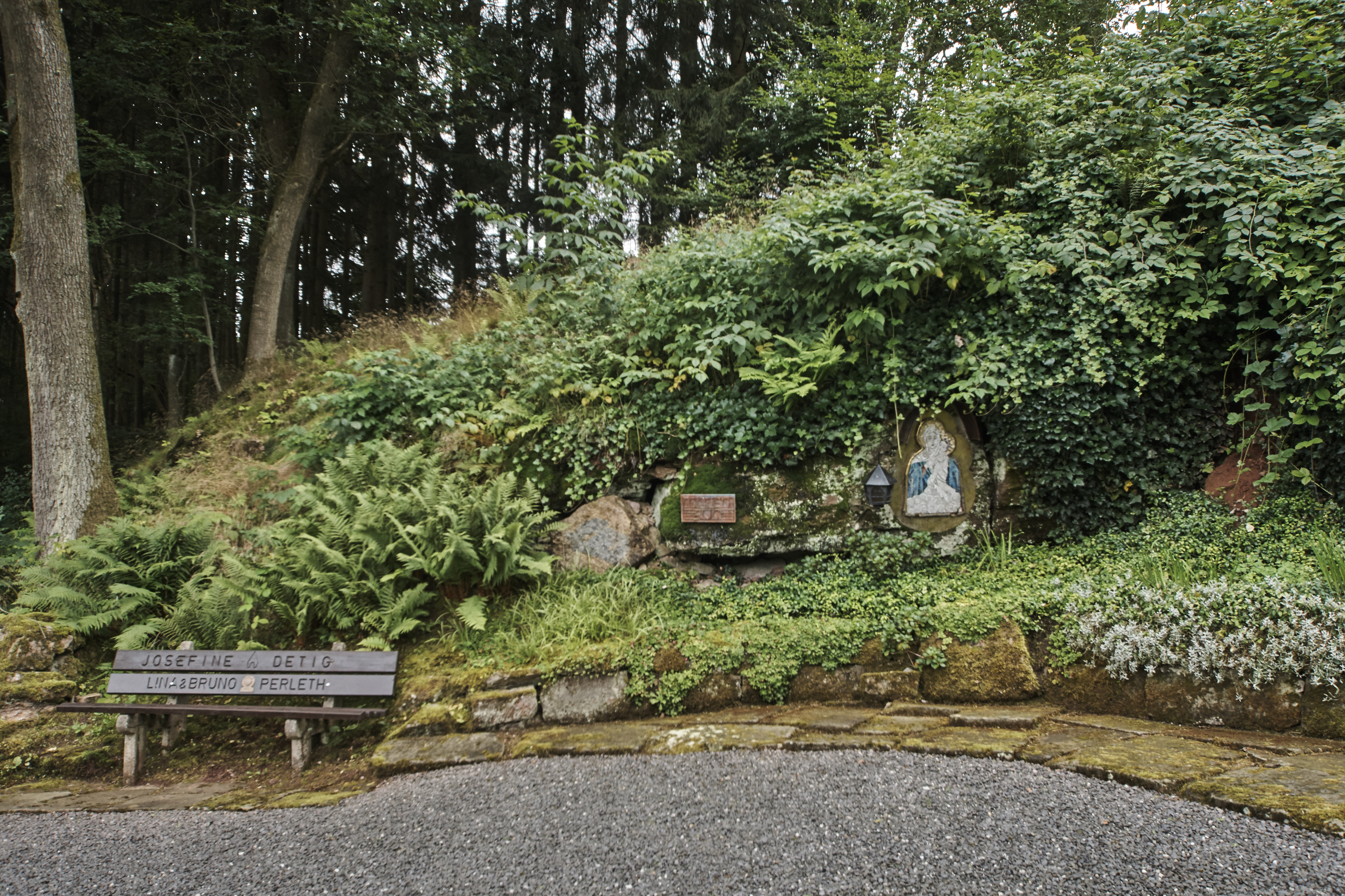 Die von Josefine Detig am "Roter Weg" in Poppenhausen gestiftete Mariengrotte